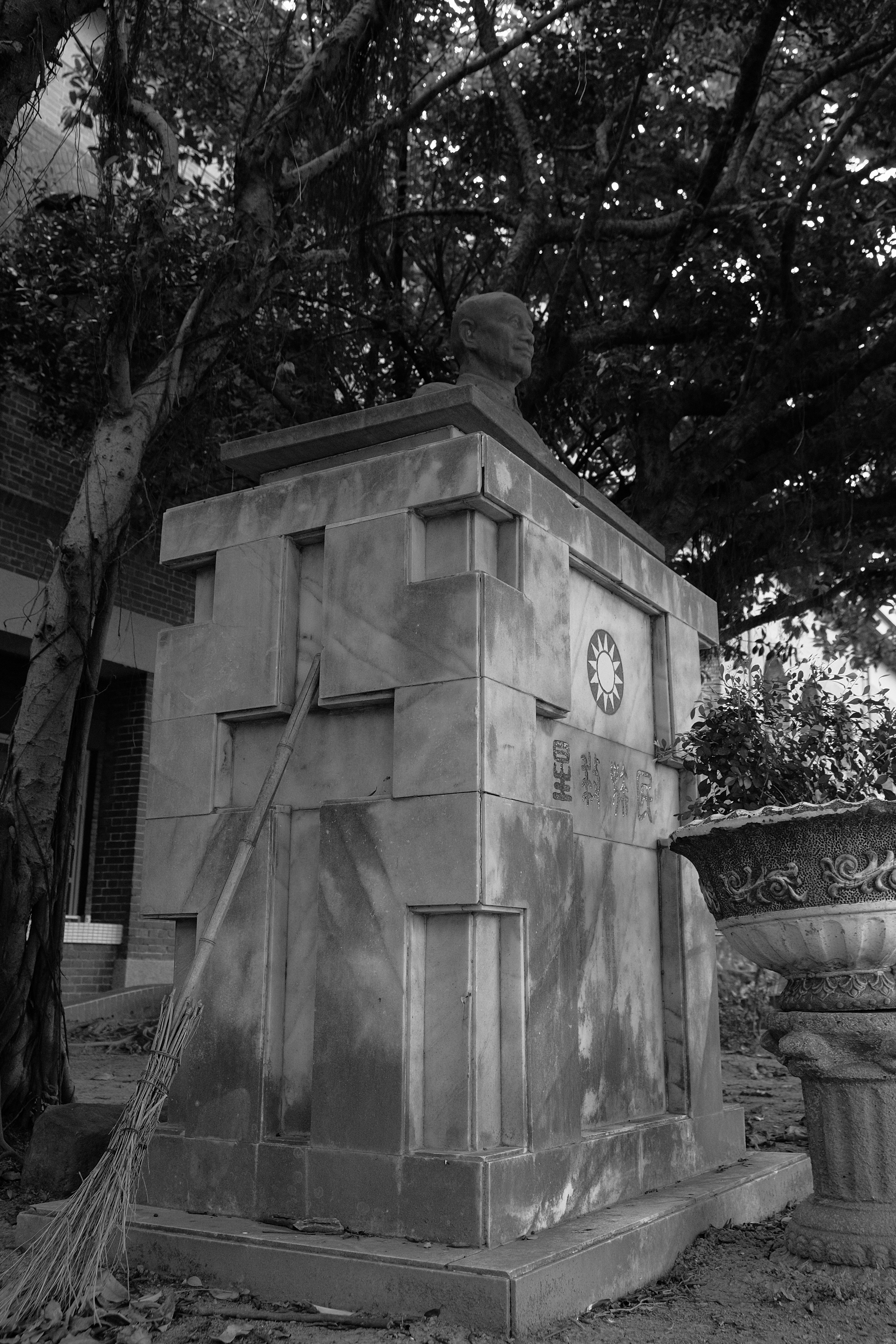 中文（台灣）: 臺北市大同區日新國民小學蔣中正胸像。